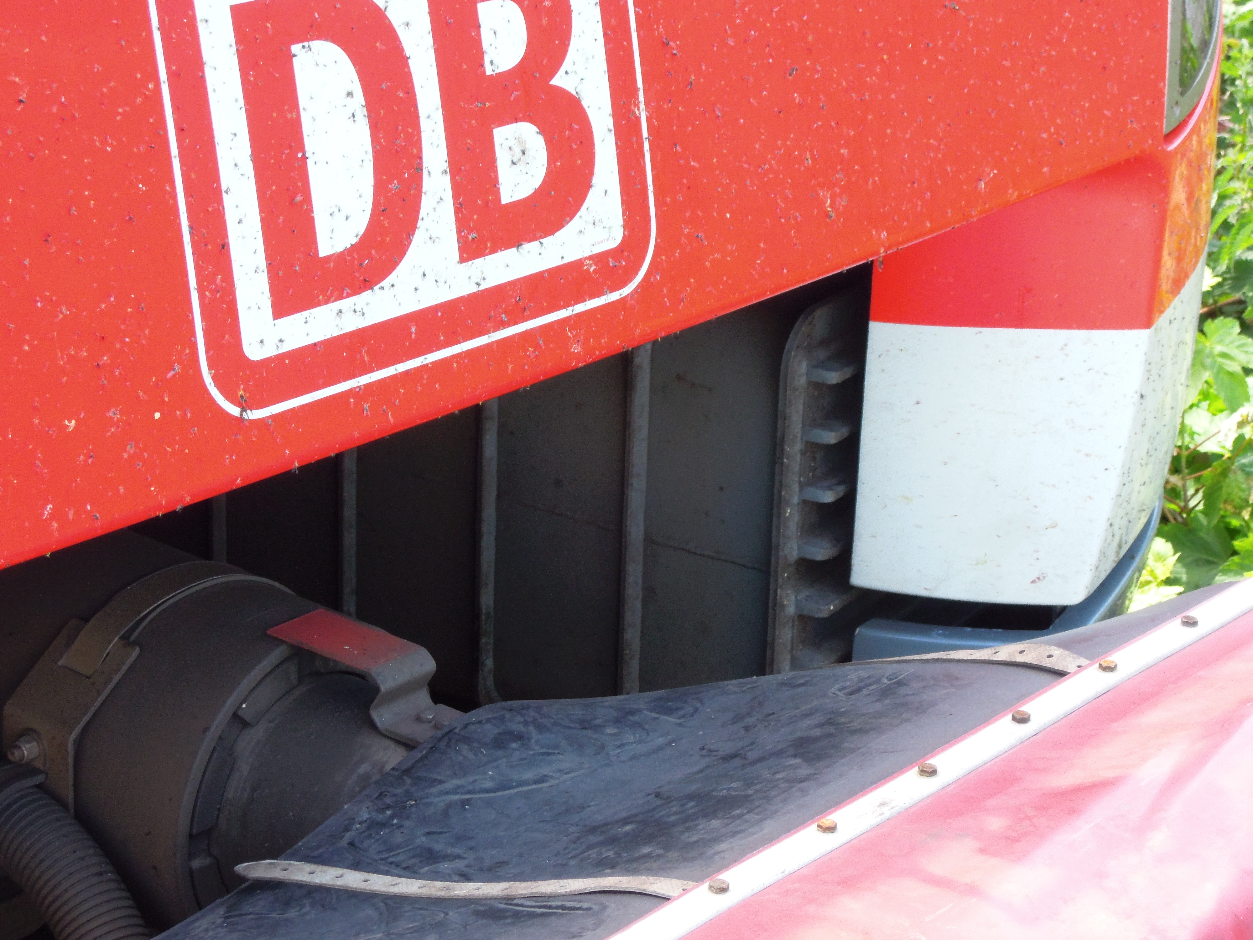 Aufkletterschutz der Baureihe 422, hinter Kunststoffverkleidung sichtbar